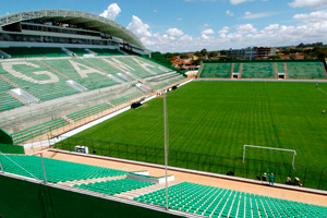 Vista de dentro